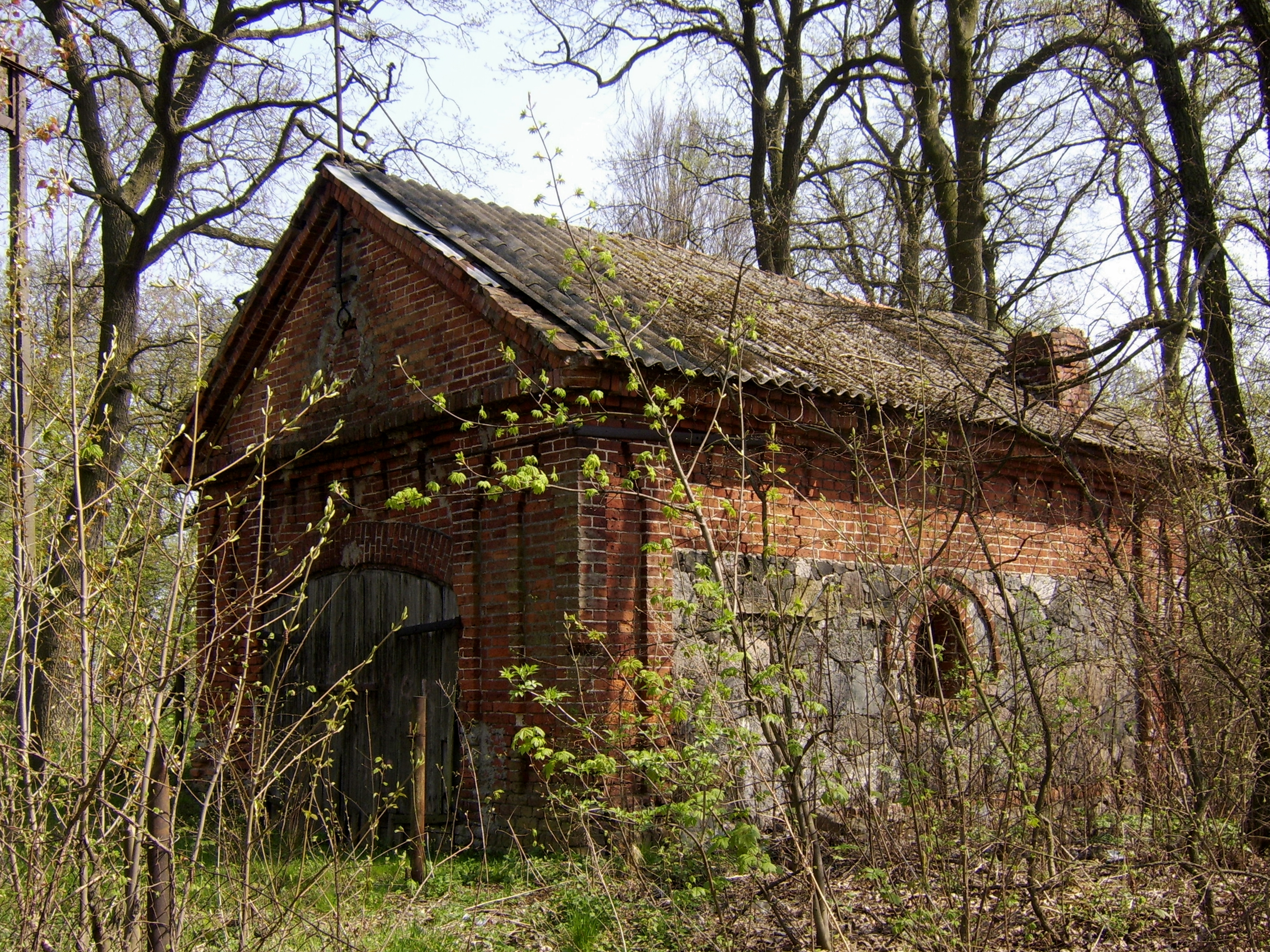 Trzebcz Szlachecki - zespół dworski, XIX-XX w.: kuźnia (3 ćw. XIX w.)